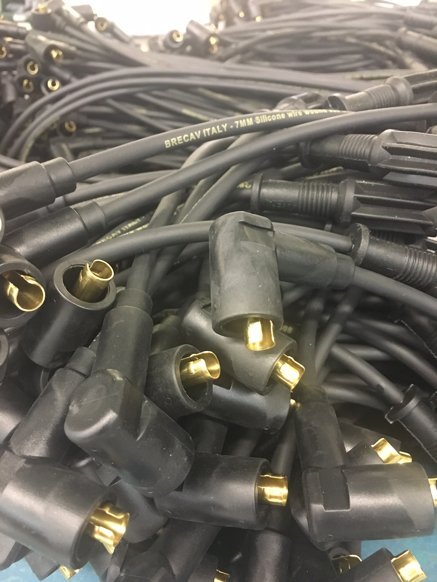 Cavo Candela Brecav